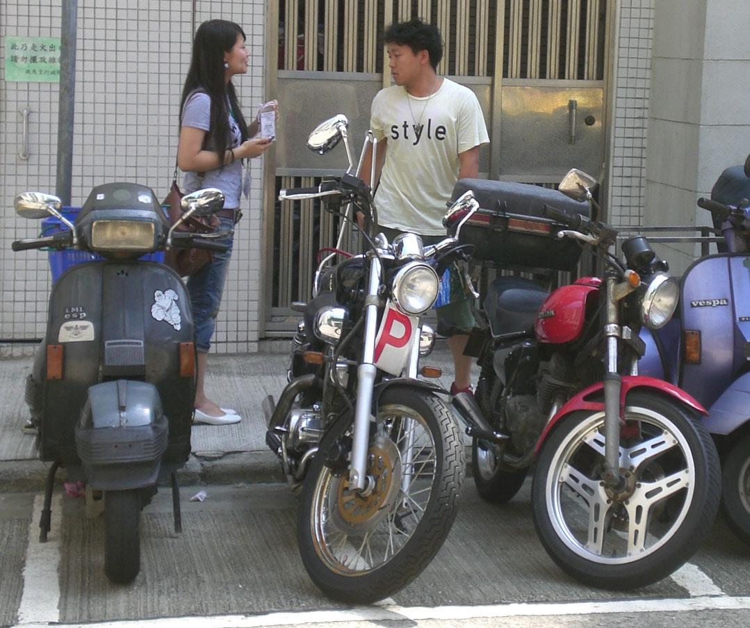 2008年香港立法會選舉, 在zh:西營盤zh:第三街救恩堂投票站的票站調查